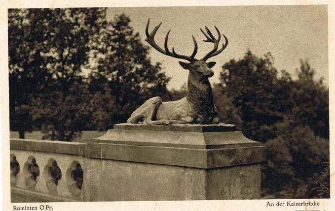 Hirsch auf der Kaiserbrücke in Rominten